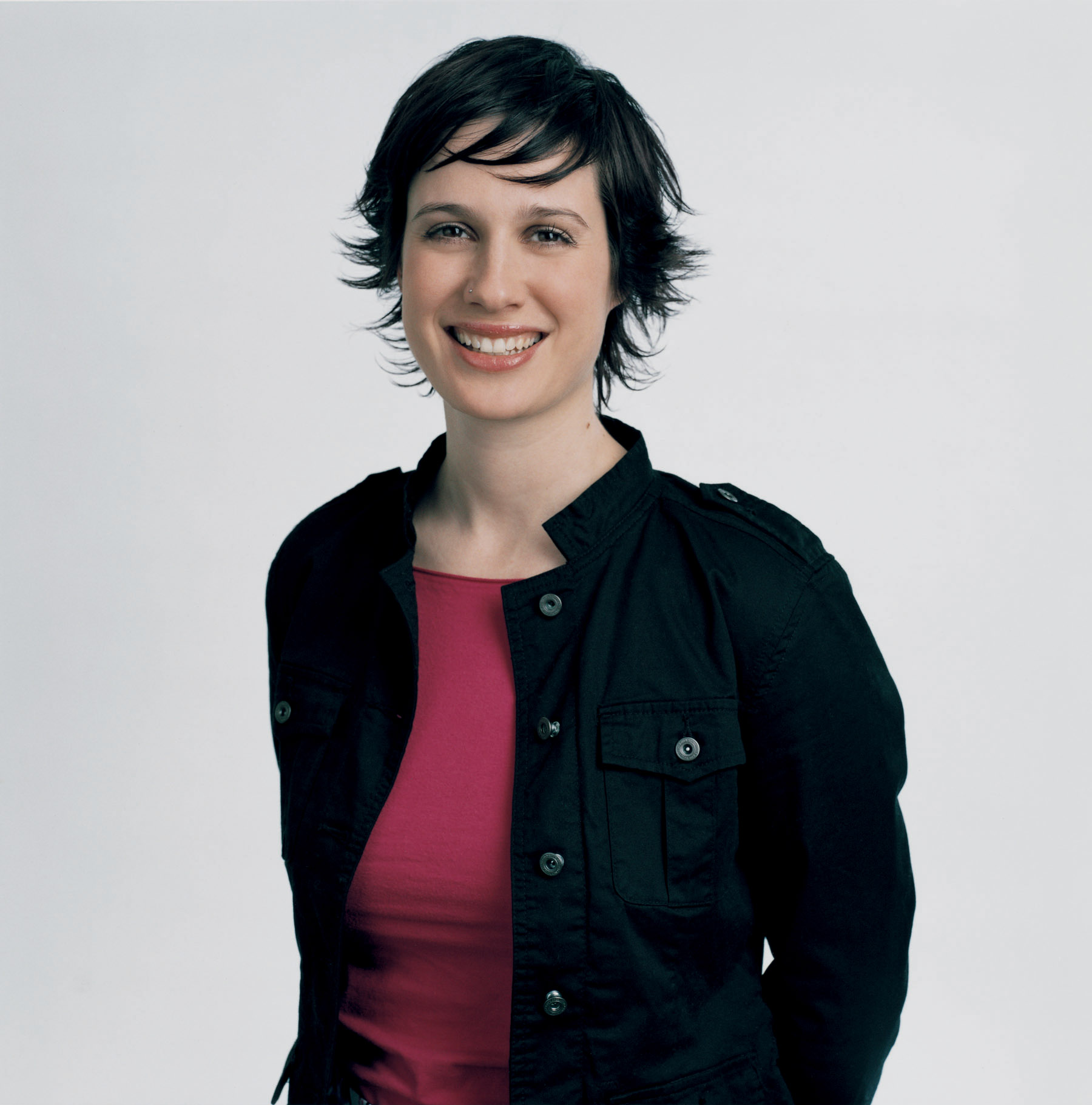 Marie Ringler. Wiener Landtagsabgeordnete und Mitglied des Wiener Gemeinderats (Die Grünen)